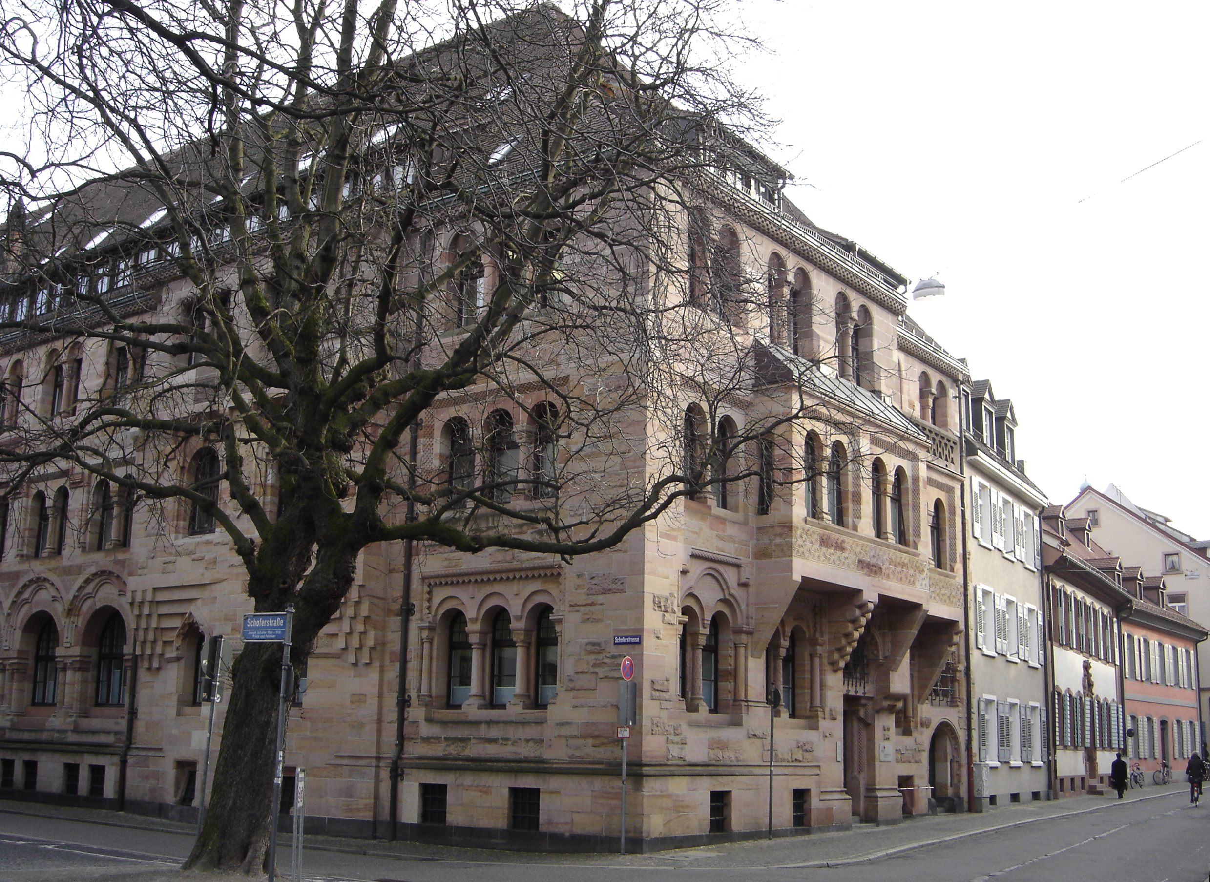 Das Erzbischöfliche Ordinatiat